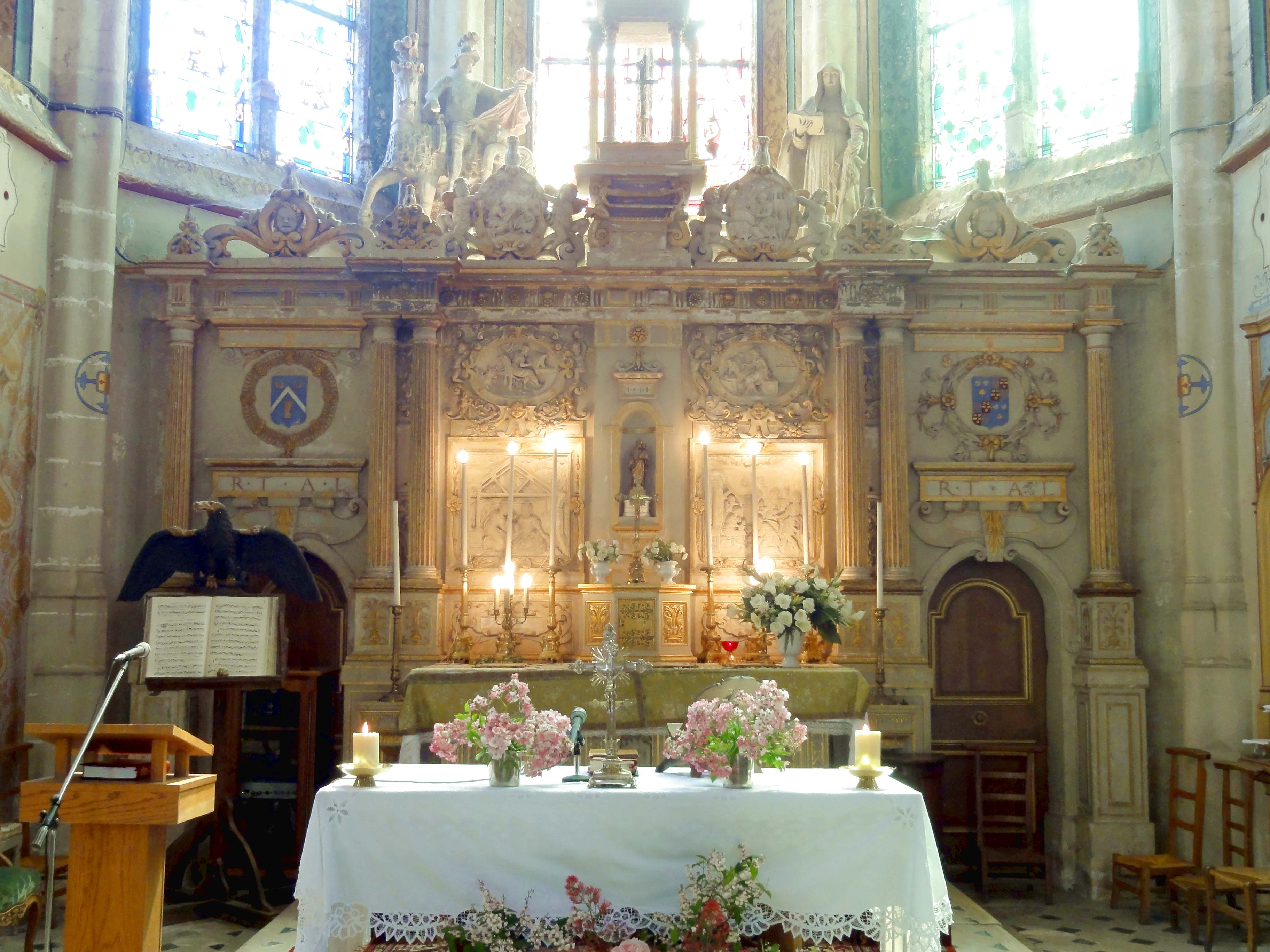 Retable en pierre de 1561 (voir titre).